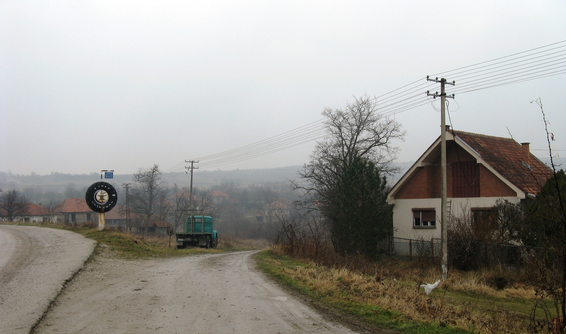 Пљаково, Куршумлија